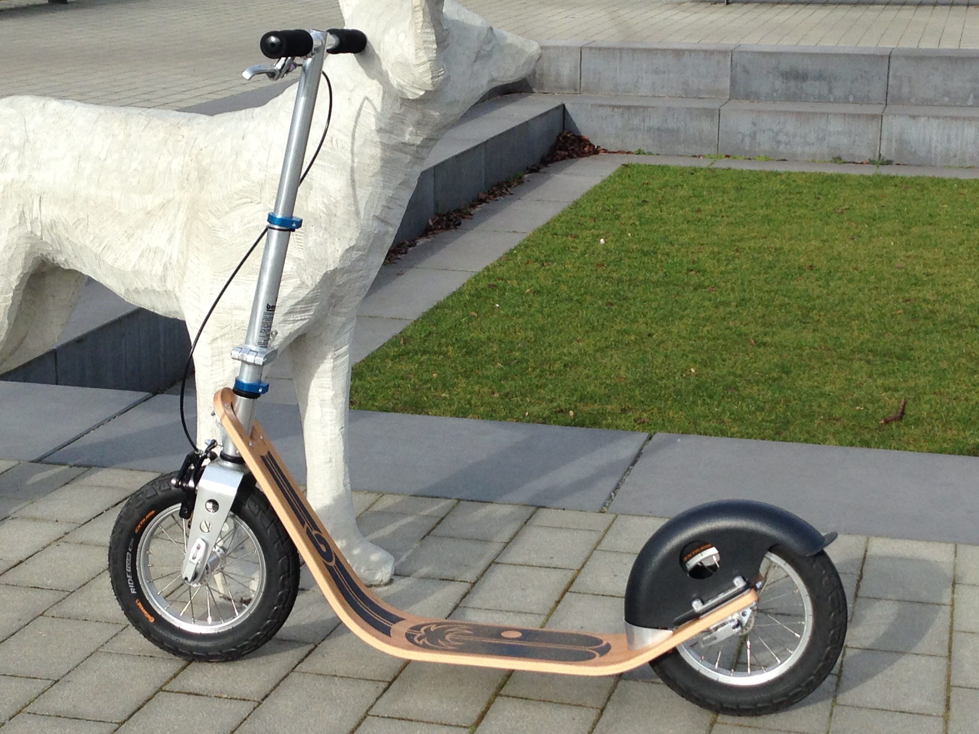 Faltbarer Tretroller mit 12-Zoll Hochdruckbereifung, mit nachgebendem Trittbrett, Felgenbremse vorn, abnehmbarem Schutzblech hinten, Gewicht 5,8 kg - Modell "Boardy Original Bamboo", der Firma Boardy on Board, handgefertigt mit Materialien die fast alle aus Europa stammen.